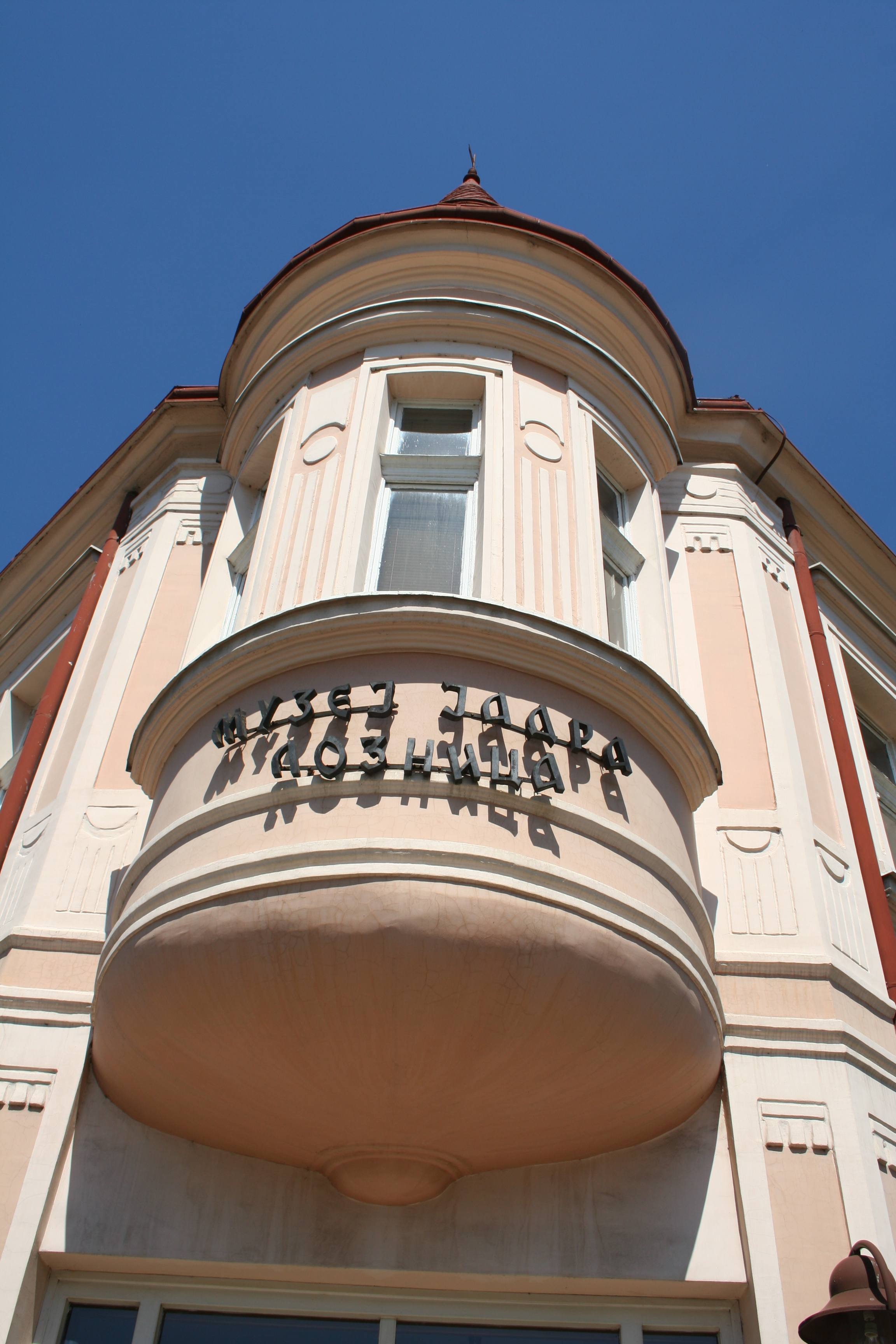 Stara apoteka (Muzej Jadra), Loznica